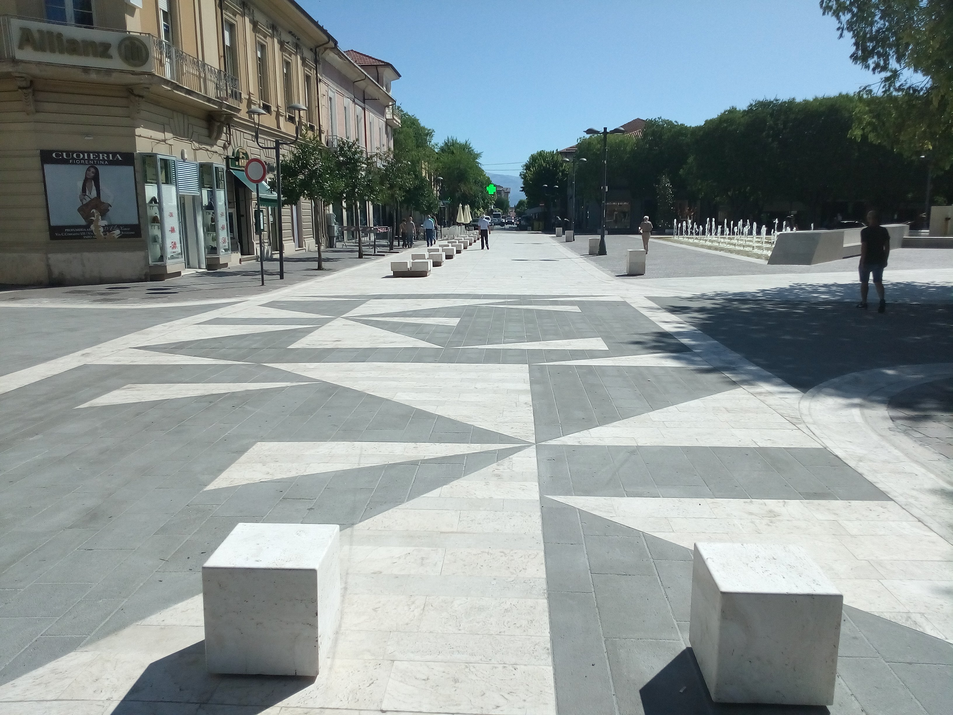 Area pedonale raffigurante la chimera geometrizzata